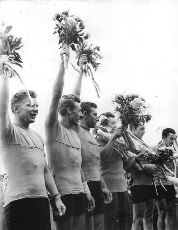 Friedensfahrt, Mannschaft der UdSSR Zentralbild Wendorf 17.5.1961 XIV. Internationale Friedensfahrt Warschau-Berlin-Prag 1961. 13. und letzte Etappe von BRNO nach Prag am 16.5.61. Die XIV. Internationale Friedenfahrt klang am 16.5.1961 in Prag mit einem Triumph der sowjetischen Fahrer aus. Sie belegten nicht nur durch Juri Melichow und Olympiasieger Viktor Kaptonow die ersten beiden Plätze in der Einzelwertung, sondern feierten auch im Mannschaftsklassement einen überlegenen Sie vor der DDR und Rumänien. UBz: Die sowjetischen Fahrer während der Siegerehrung. vlnr: Petrow, Kapitonow, Tscherepowitsch, Melichow, Moskwin und Saidchushin